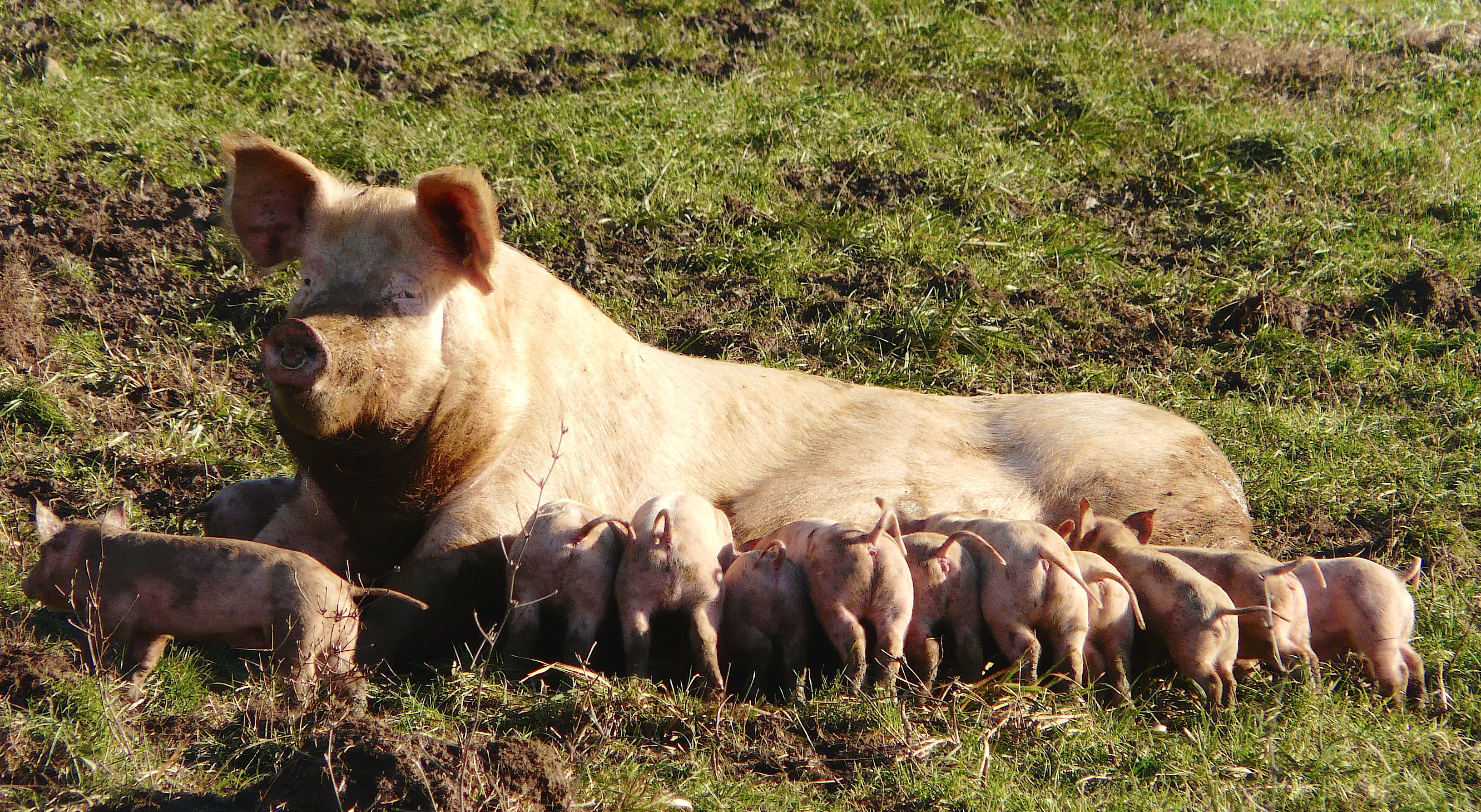 Truie et porcelets, élevage porcin de plein air à Vaunac, Dordogne, France.